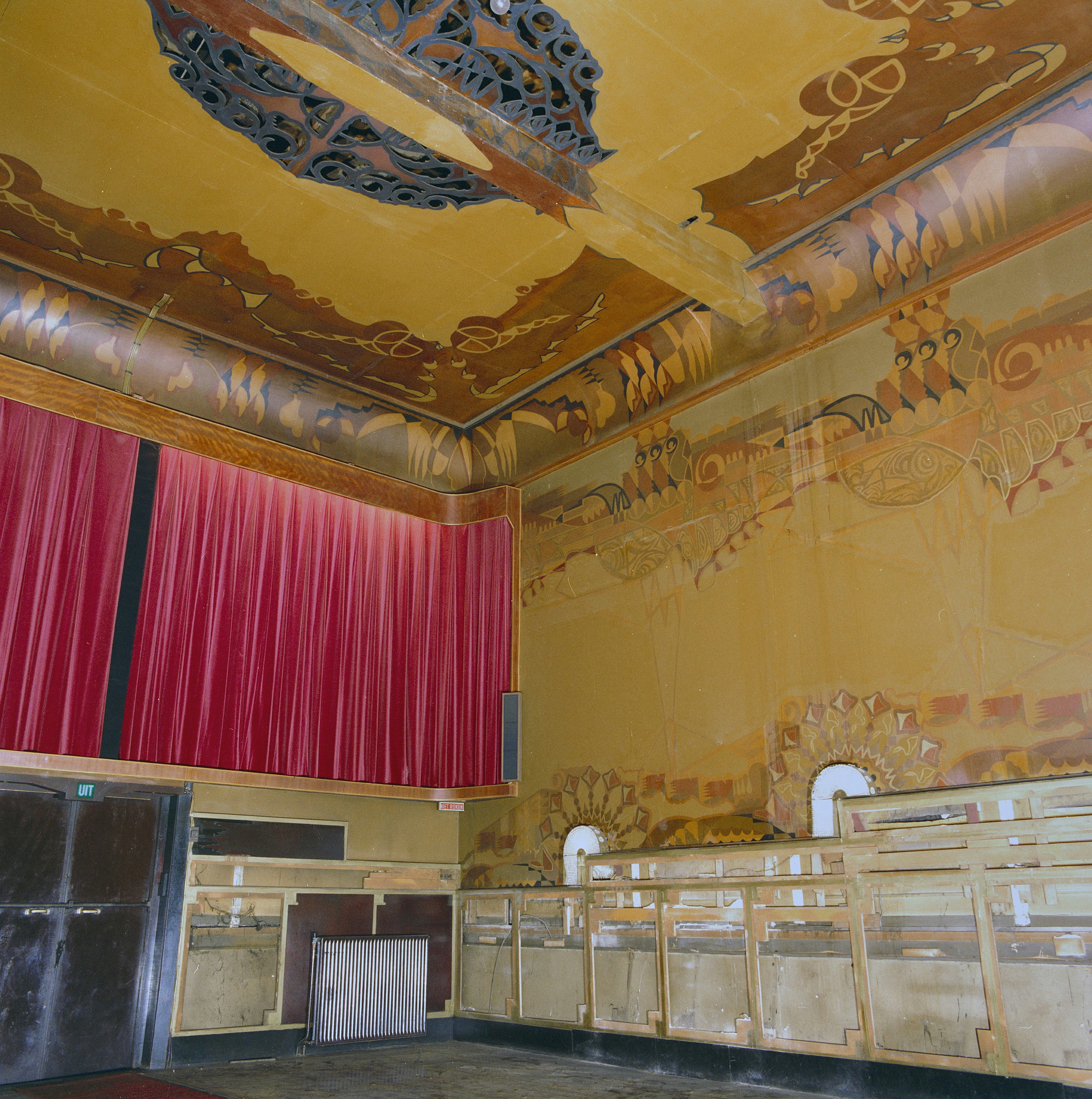 CINEMA PARISIEN: INTERIEUR, zaal met art-deco schilderingen